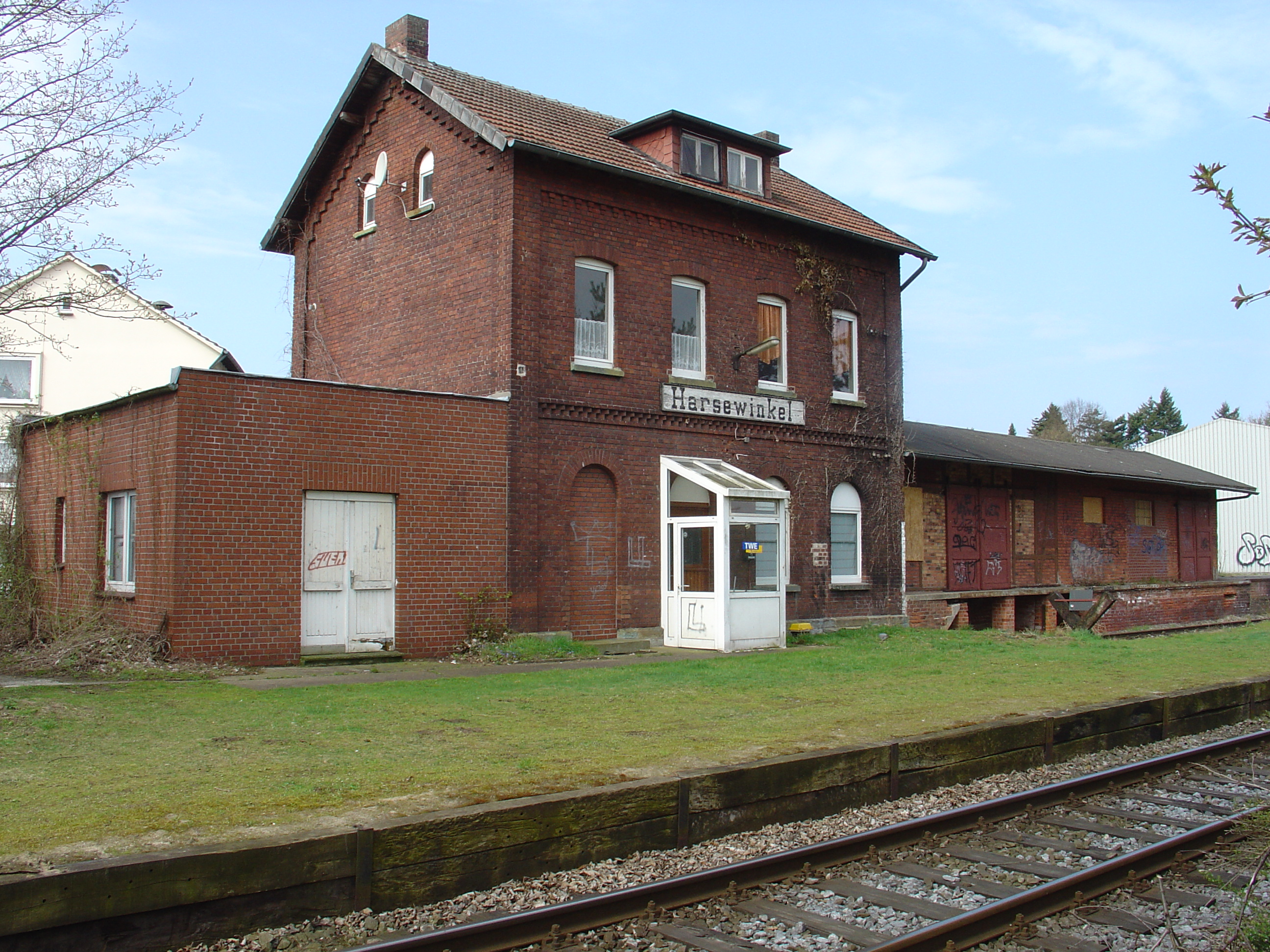 Hauptbahnhof Harsewinkel